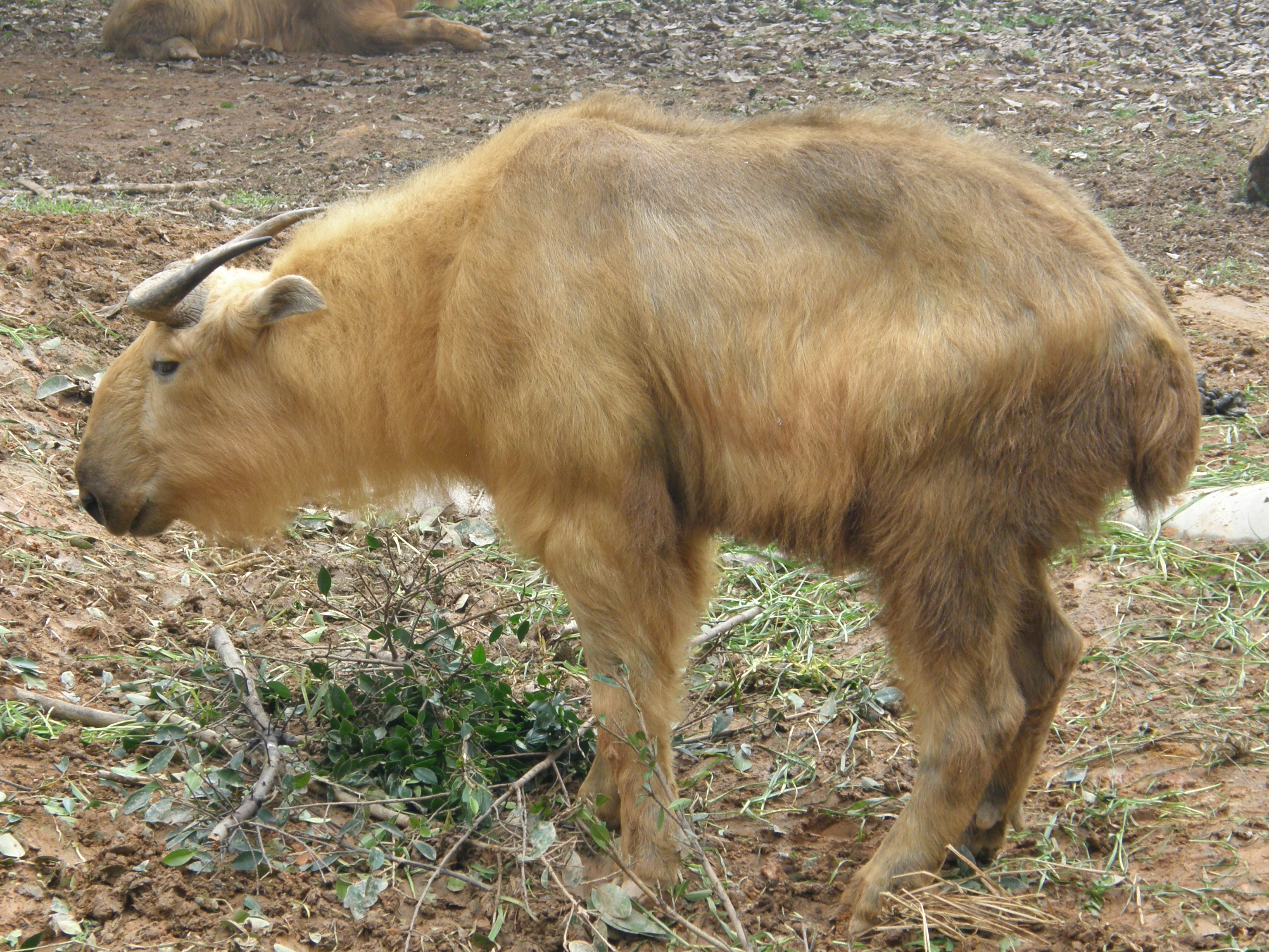 Такин в зоопарке Гуанчжоу, февраль 2012